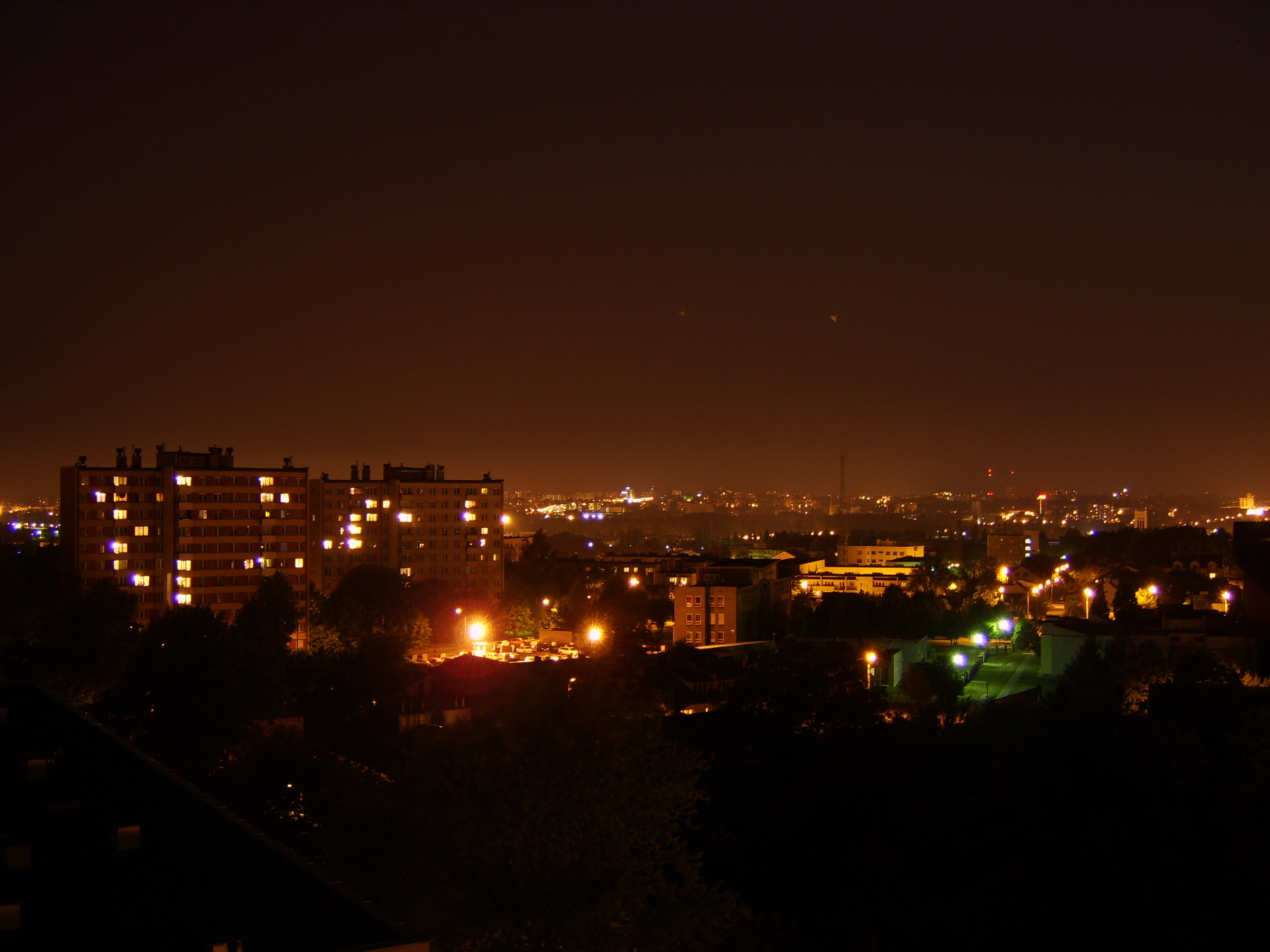 widok na lublin nocą